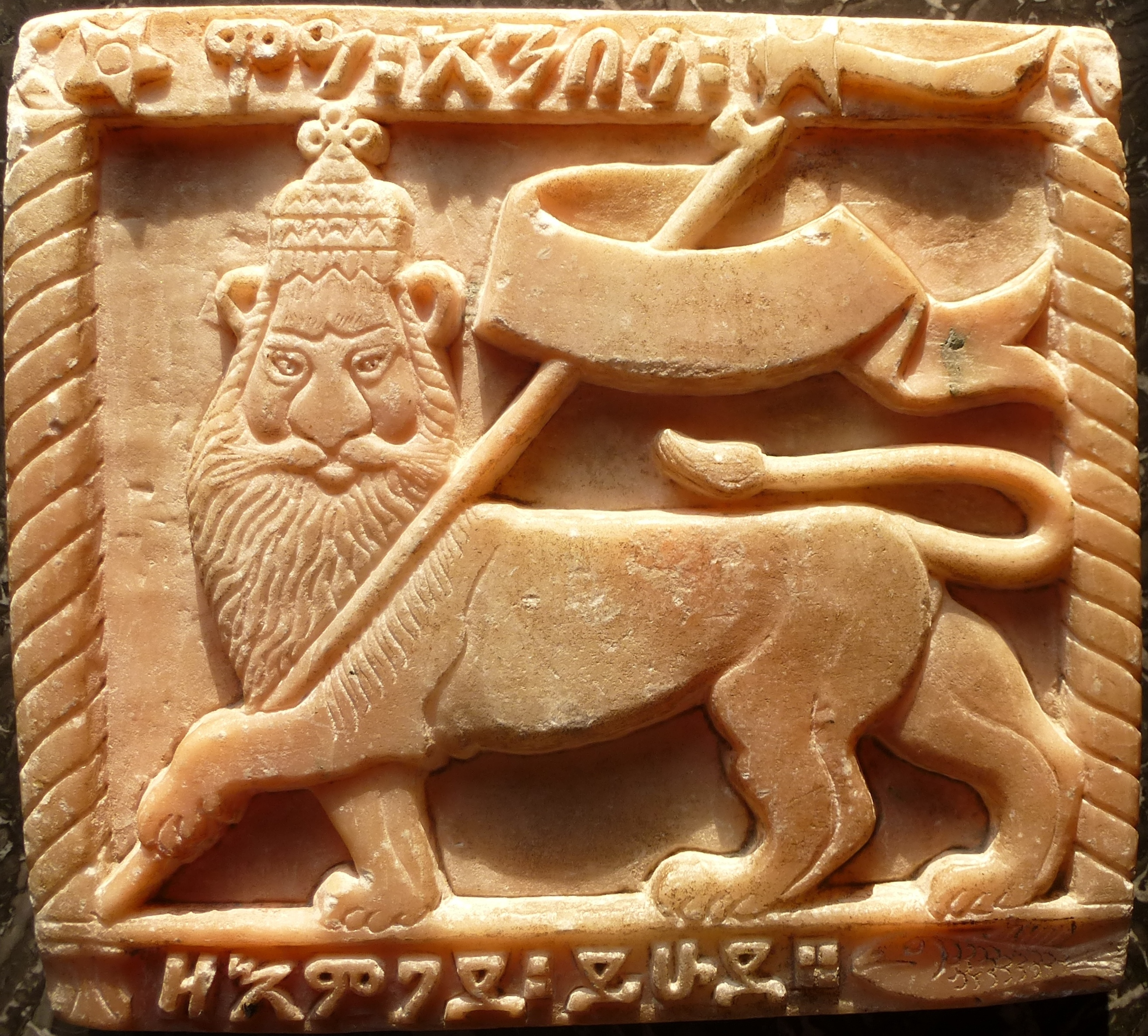 Lion of Juda, Ethiopia